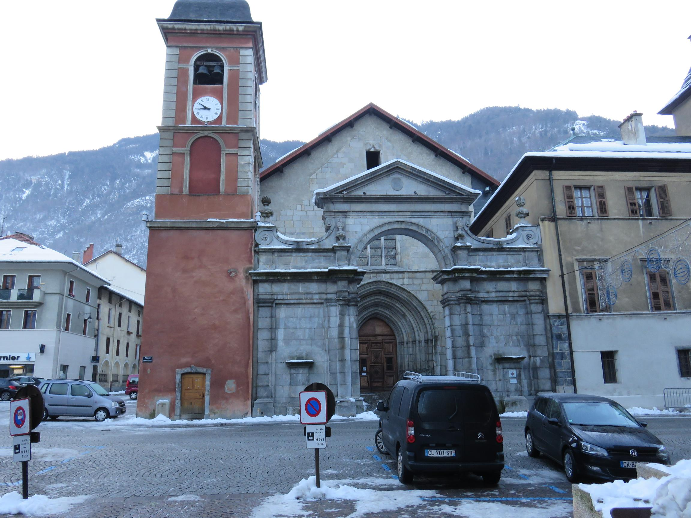 Moûtiers centre-ville